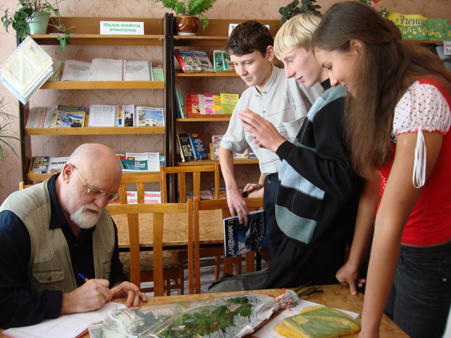 Библиотека